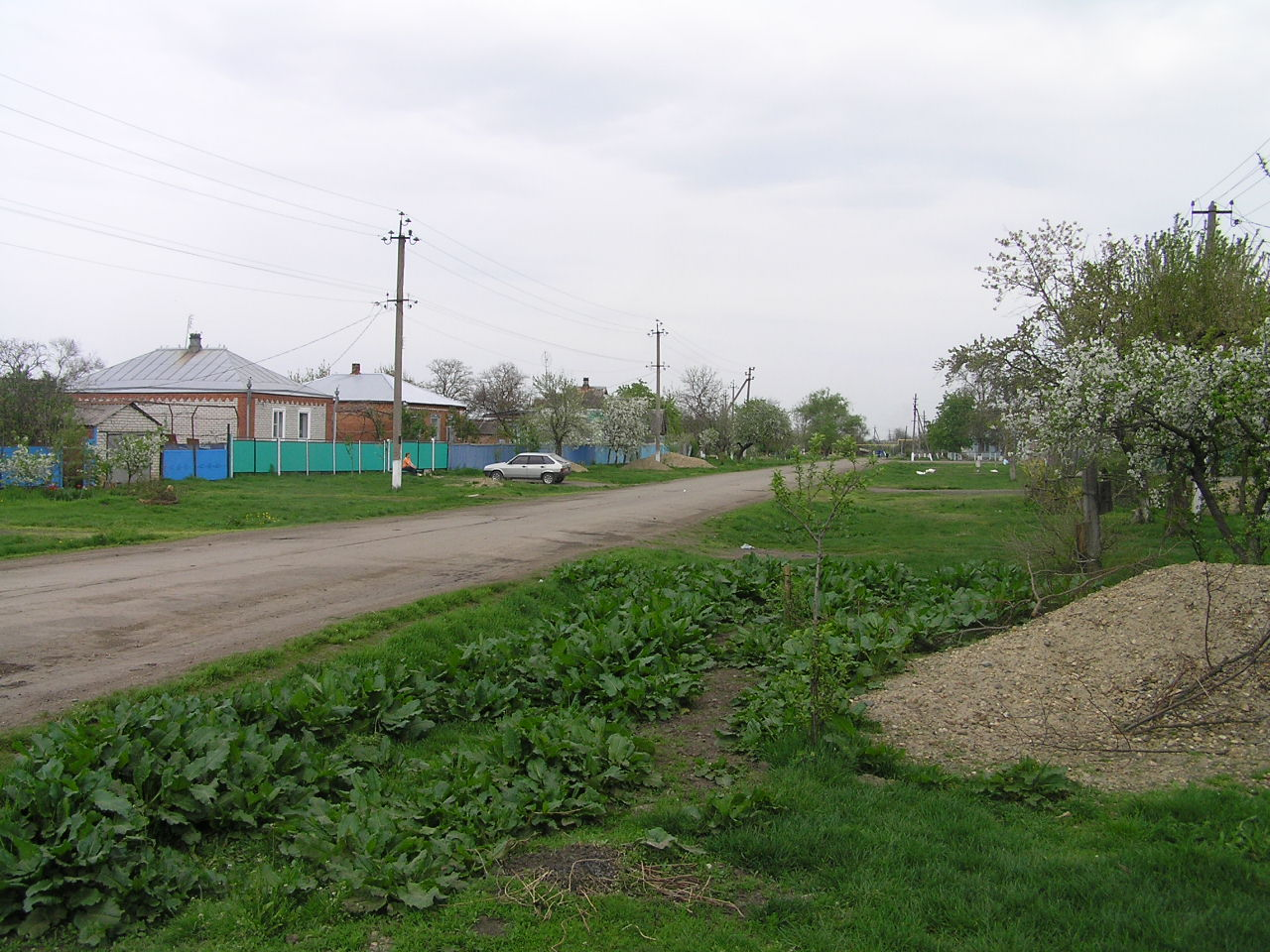 улица Советская в х.Чернышев